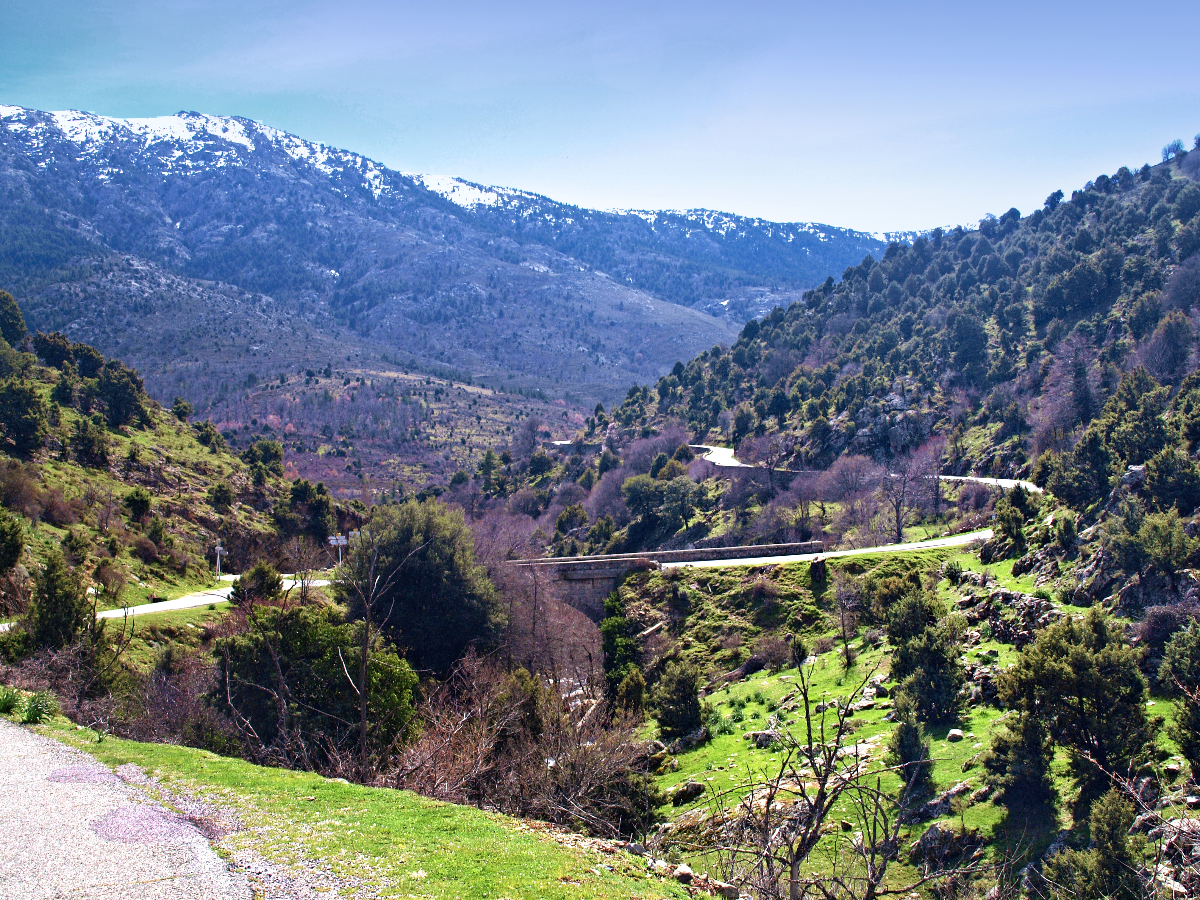 Corscia (Corsica) - Cuccia, pont de la D84 sur l'Erco